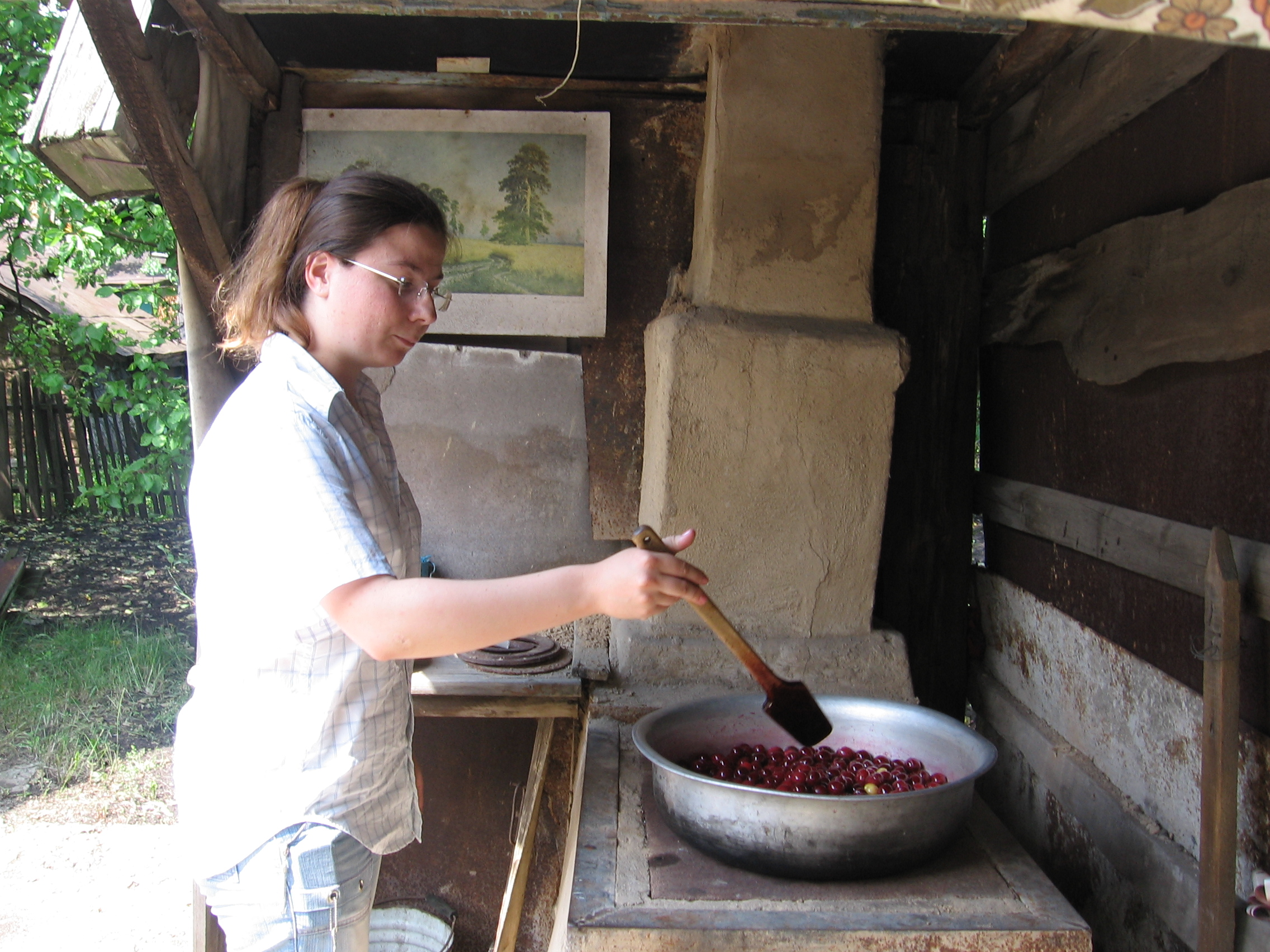 Копистка